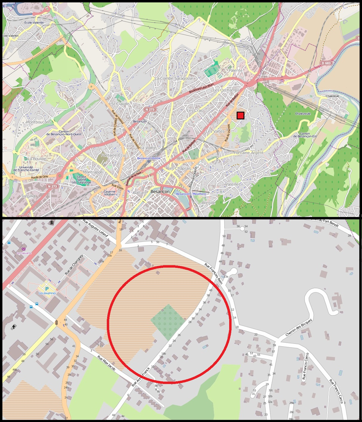 Carte du cimetière juif de Besnaçon réalisée sur Paint à partir de fichiers originaires de OpenStreetMap (